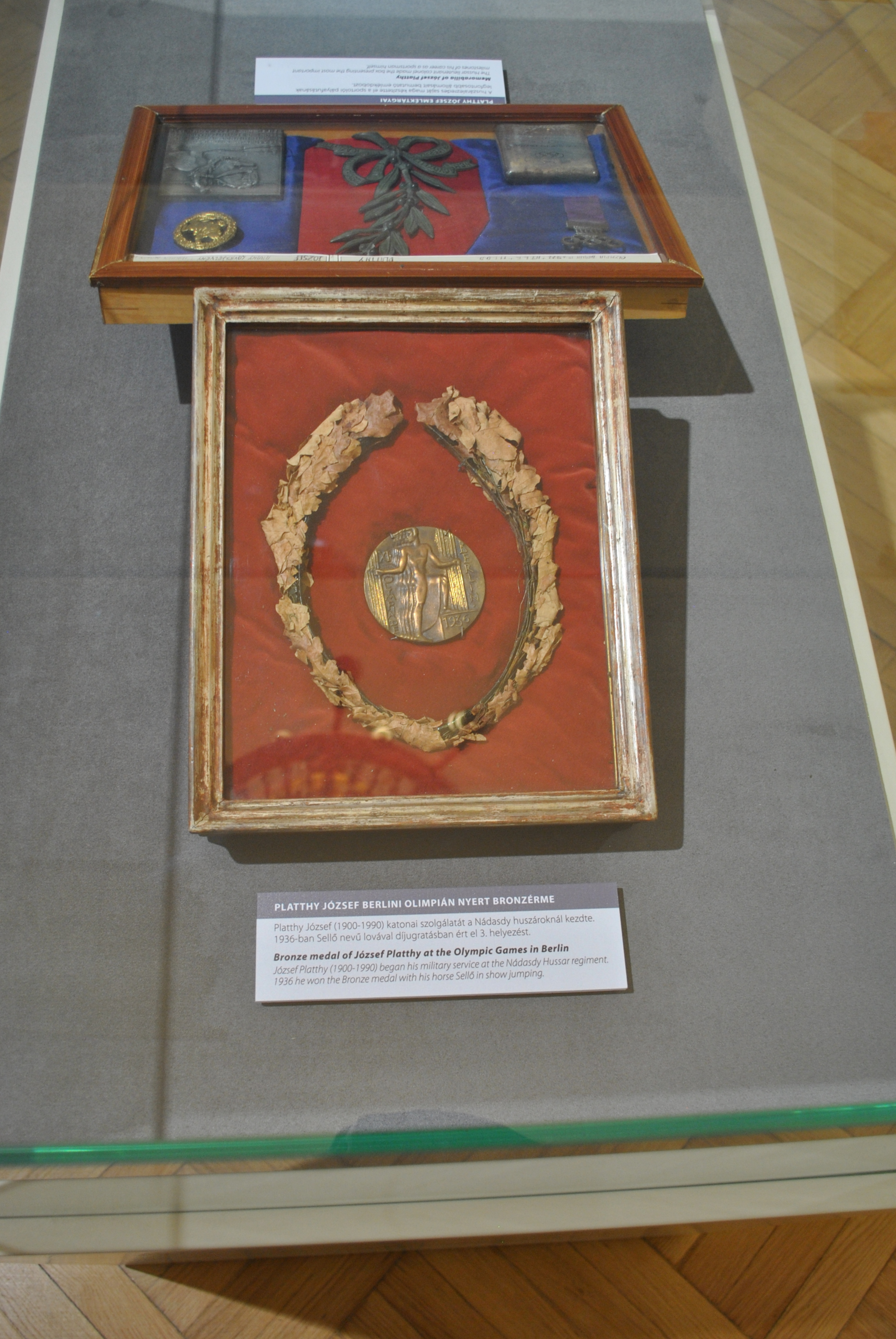 Nádasdy Ferenc Múzeum, Sárvár